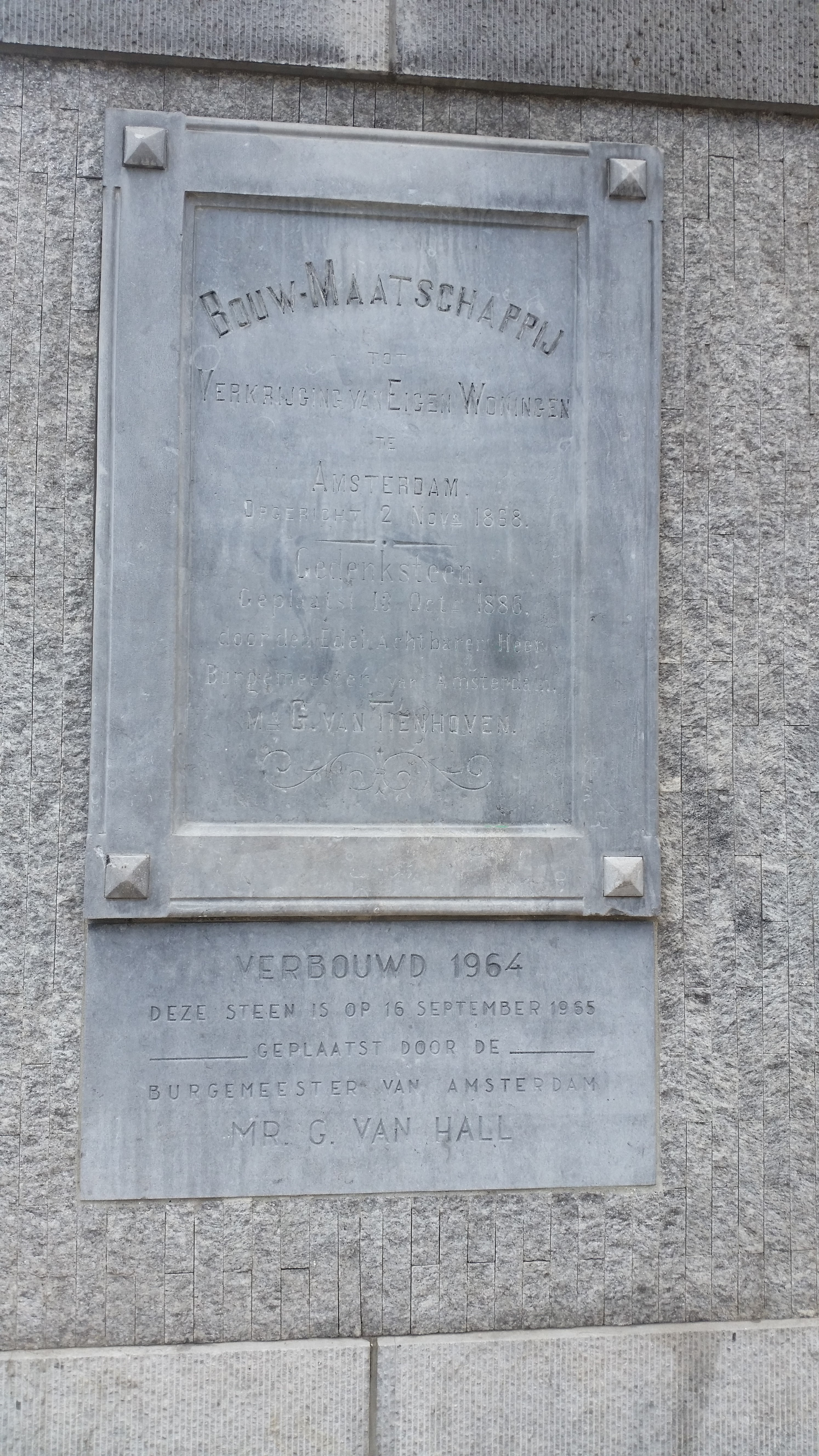 Plaquette in de Tweede Hugo de Grootstraat (tussen het Hugo de Grootplein en de Van Houweningenstraat